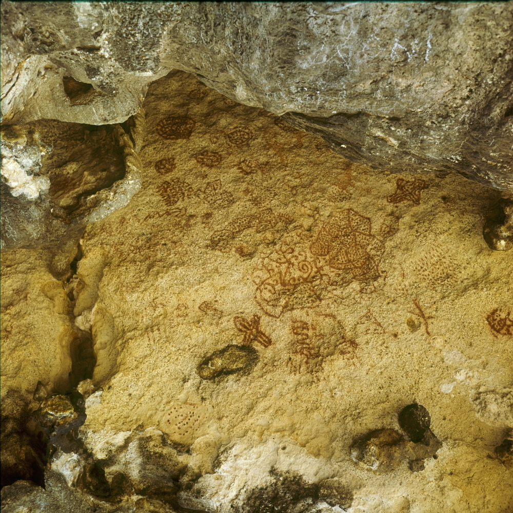 Dia. De Arawak indianen zijn het Inheemse volk dat je in grote delen van het Caraïbisch gebied, de Guyanas en Brazilië kon en kunt aantreffen. Een andere naam voor hen op de eilanden was de Taino, waartoe weer de Caiquetio behoorden die op Aruba en Bonaire zaten. Deze volken zijn daar vanaf ca. 2500 vC gekomen. De rotstekeningen op de foto zijn van ouder datum en kunnen met enige waarschijnlijkheid worden toegeschreven aan de Dabajuro cultuur (3480-2325 vC).